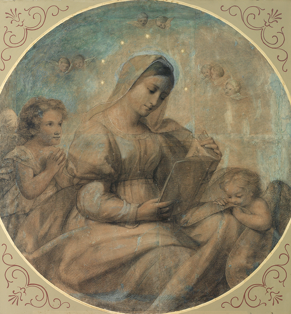 Maria beim Studium mit zwei geflügelten Putten. Farbkreide über Kohle. 1816 (Von den Hauptfehlern gereinigt und ganz übergangen 1843). Durchmesser 104 cm.